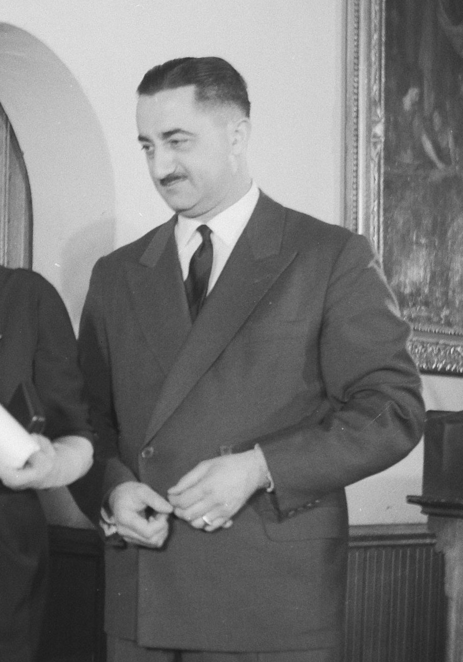 Collectie / Archief : Fotocollectie Anefo Reportage / Serie : [ onbekend ] Beschrijving : Uitreiking "Edward Award Medal" Annotatie : Postuum toegekend aan dr. A. Plesman en uitgereikt aan zijn weduwe mevr. S.J. Plesman - Van Eijck in de rolzaal van de Ridderzaal te Den Haag. Links naas haar Fons Aler, president-directeur van de KLM. Rechts de voorzitter van de International Civil Aviation Organisation; Walter Binaghi Datum : 22 januari 1960 Locatie : Den Haag Trefwoorden : luchtvaart, onderscheidingen Fotograaf : Pot, Harry / Anefo Auteursrechthebbende : Nationaal Archief Materiaalsoort : Negatief (zwart/wit) Nummer archiefinventaris : bekijk toegang 2.24.01.03 Bestanddeelnummer : 910-9657 Reacties Geplaatst door Maaike op 27 oktober 2012 - 16:17. Postuum eerbetoon aan dr. Albert Plesman. Edward Warner Award Medal. V.l.n.r.: onbekend; ir. I.R. Aler; mw. S.J. Plesman-van Eijk; Walter Binaghi Trefwoorden: internationale burger luchtvaart Locatie: Rolzaal van het Binnenhof te Den Haag